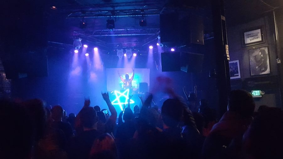 Shredder 1984 en concert au Whisky A Go Go 2018